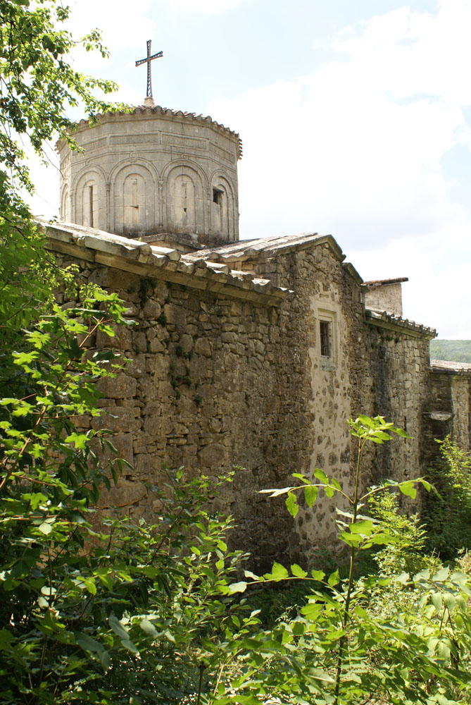 Восточная стена церкви Сурб-Ншан монастыря Сурб-Хач